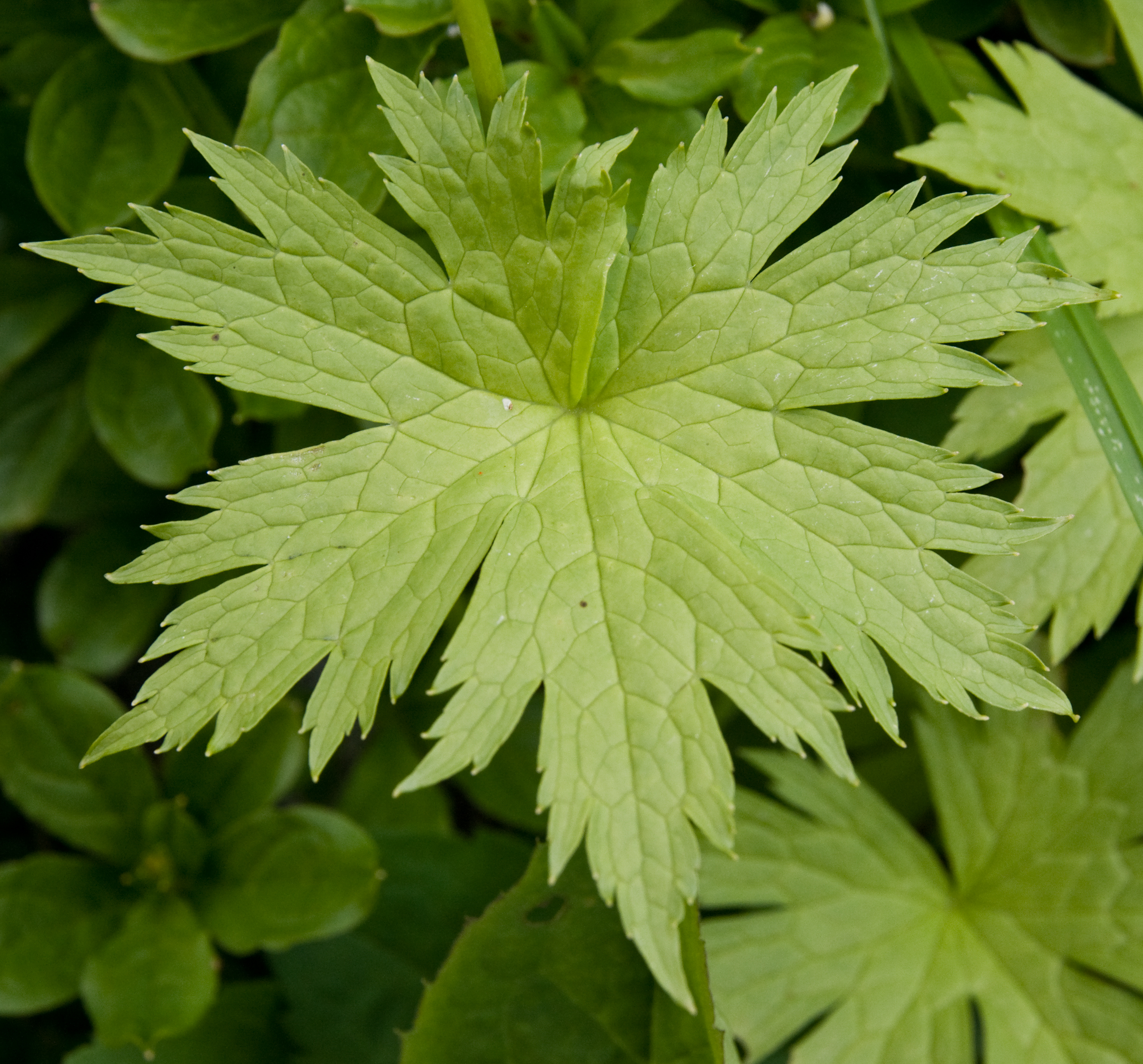 モミジカラマツ (学名:Trautvetteria caroliniensis)